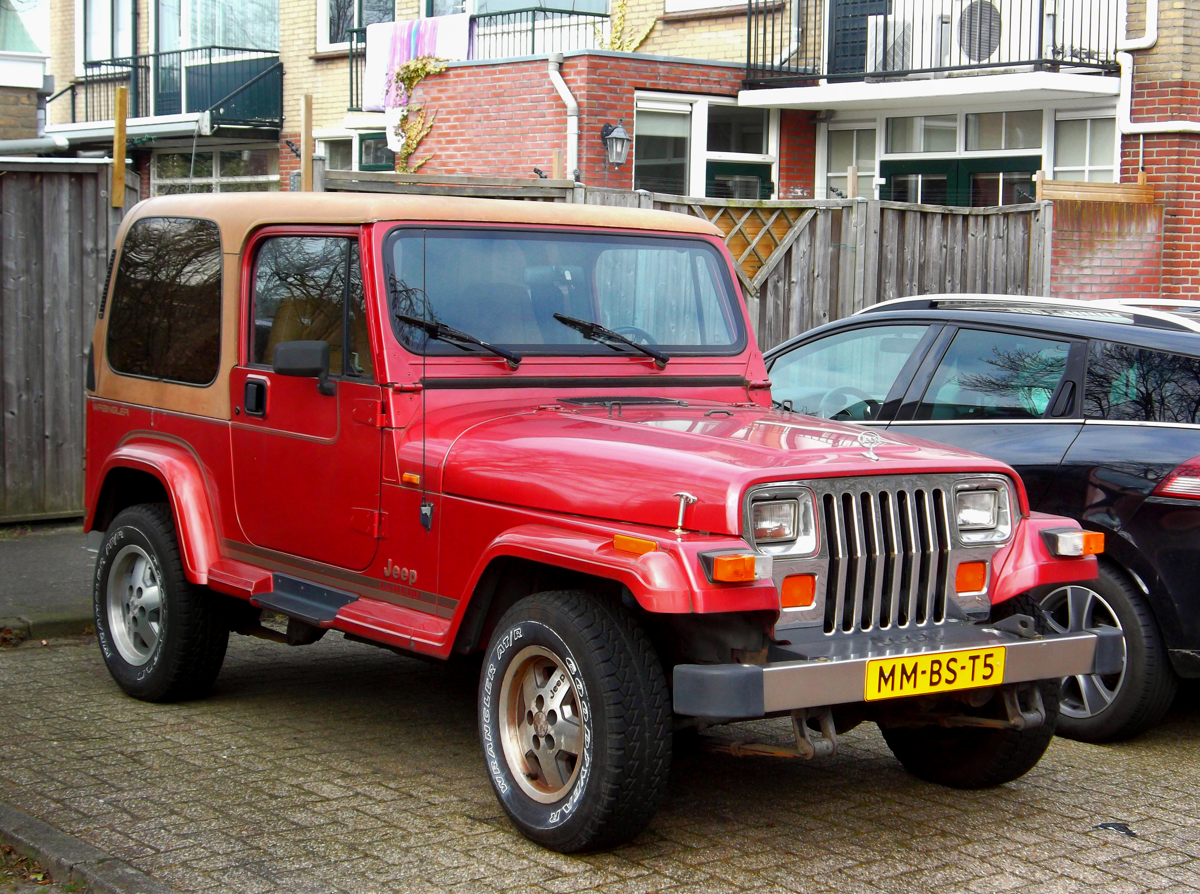 MMBS.